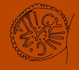 Röm. Ziegelstempel in Form einer Scheibe auf Dachziegelbruchstück, Stift Klosterneuburg, Kreuzgarten Ost, DM 6,5 cm/Stempel 2,92 cm, 101-114. n.Chr. Quelle: Hannsjörg Ubl: I. Das Römische Lapidarium, Stiftsmuseum Klosterneuburg 1991, S. 30